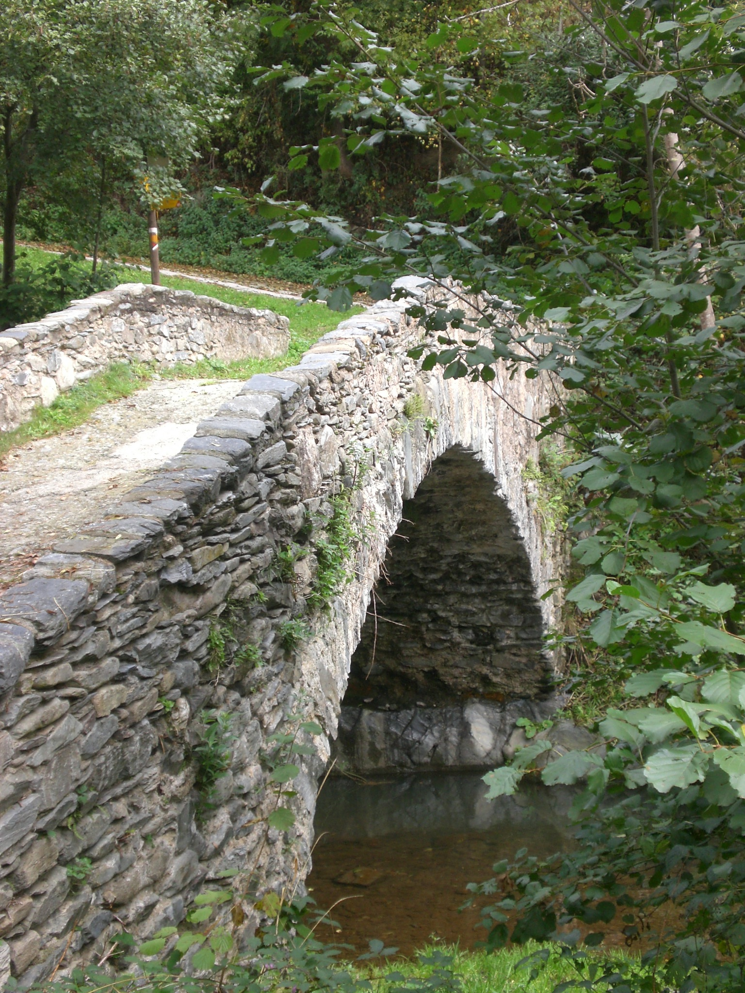 Pont del Molí Fumat (Molló)